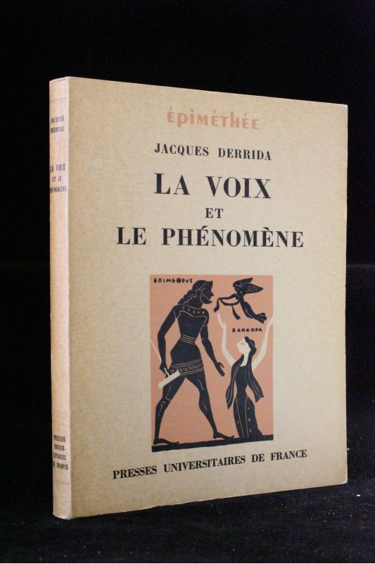 Edition originale de La Voix et le phénomène, PUF, 1967, coll. Epiméthée